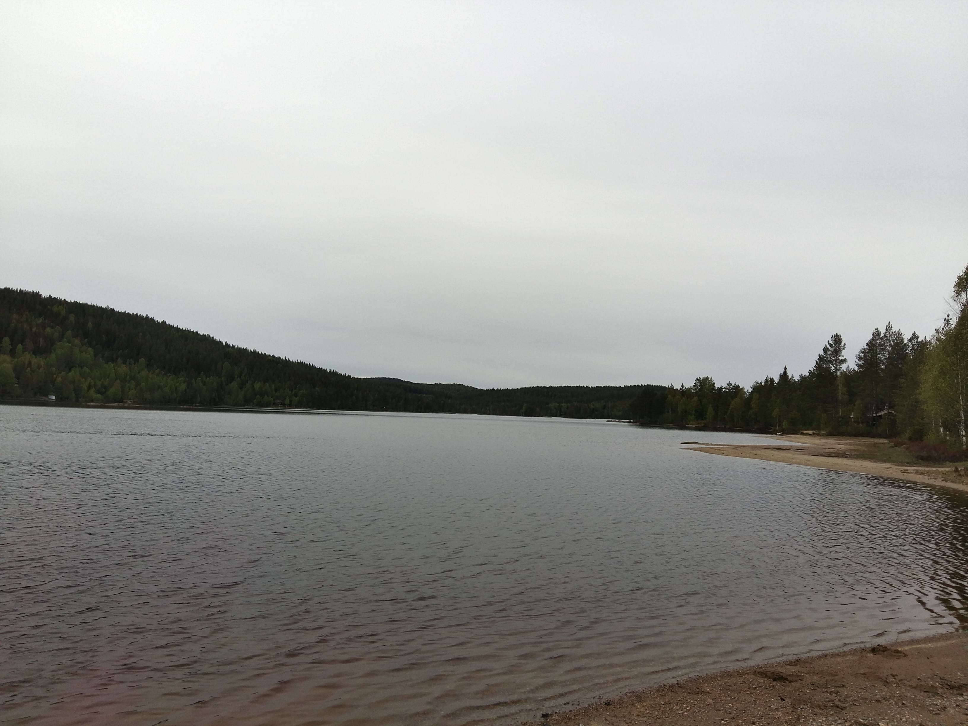 Søndre Vælsvannet i Ringerike, Buskerud.